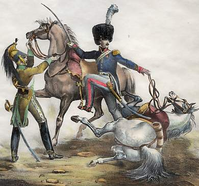 Général_Rémy_Isidore_Joseph_Exelmans_à_Vertingen